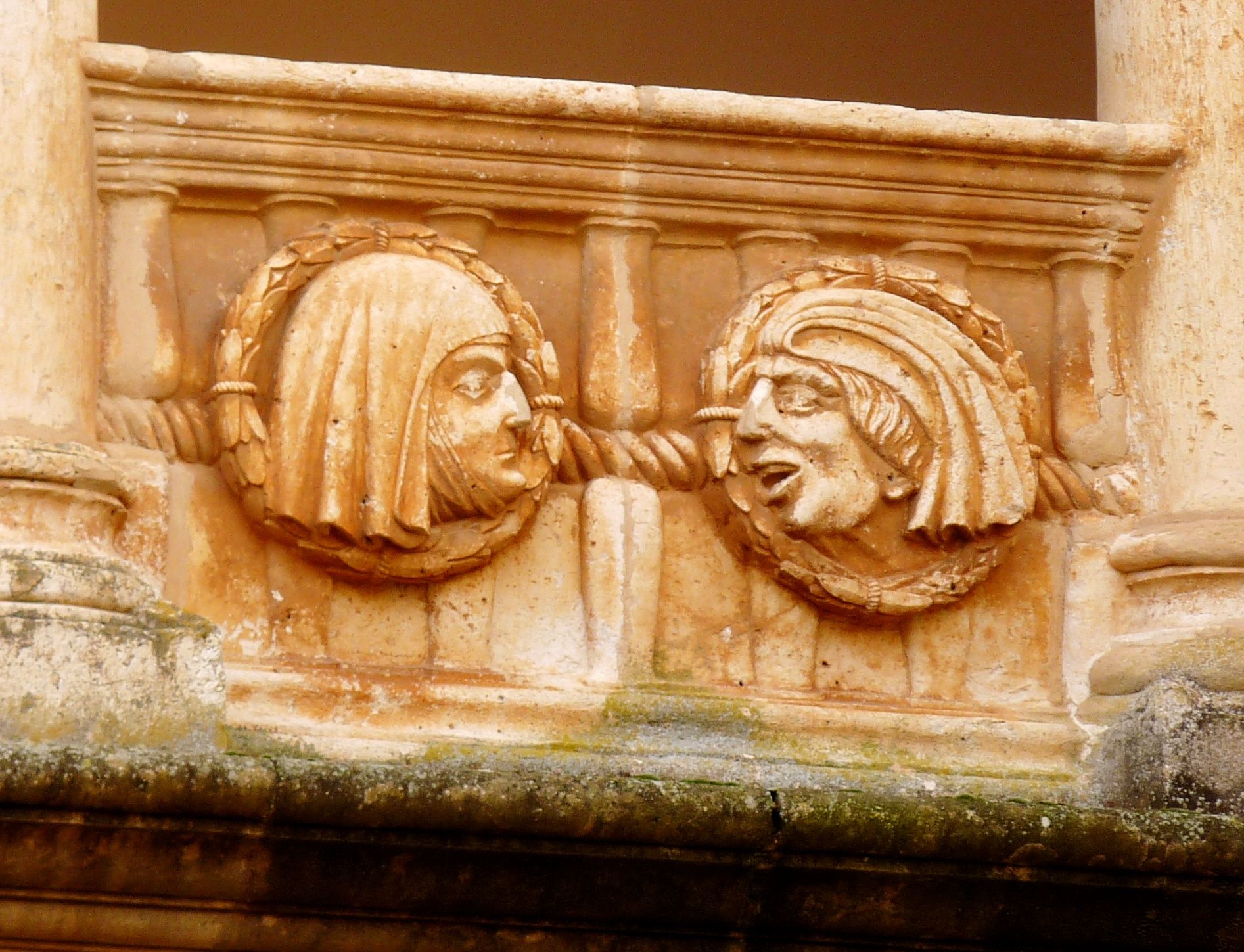 Monasterio de Santa María de Huerta - Claustro plateresco - Medallones - Izq. Doña Blanca de Castilla; dcha. Enrique IV de Castilla